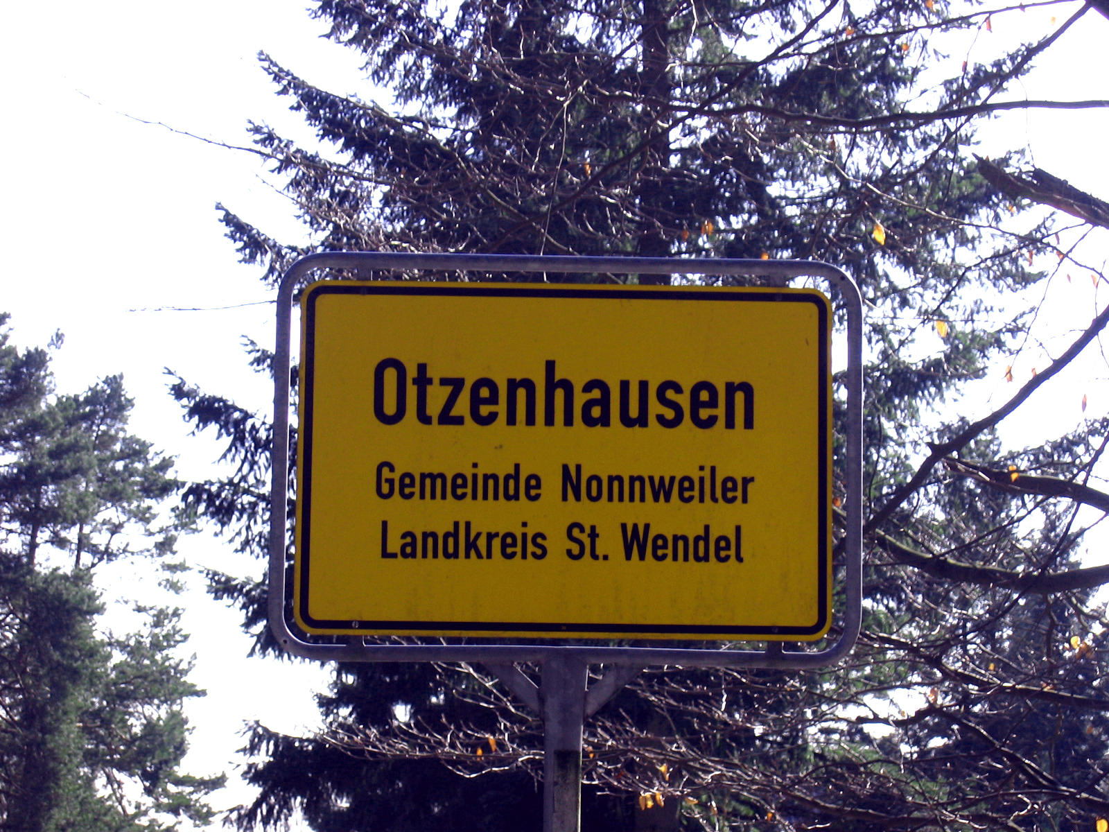 Otzenhausen - Panneau à l'entrée de la localité